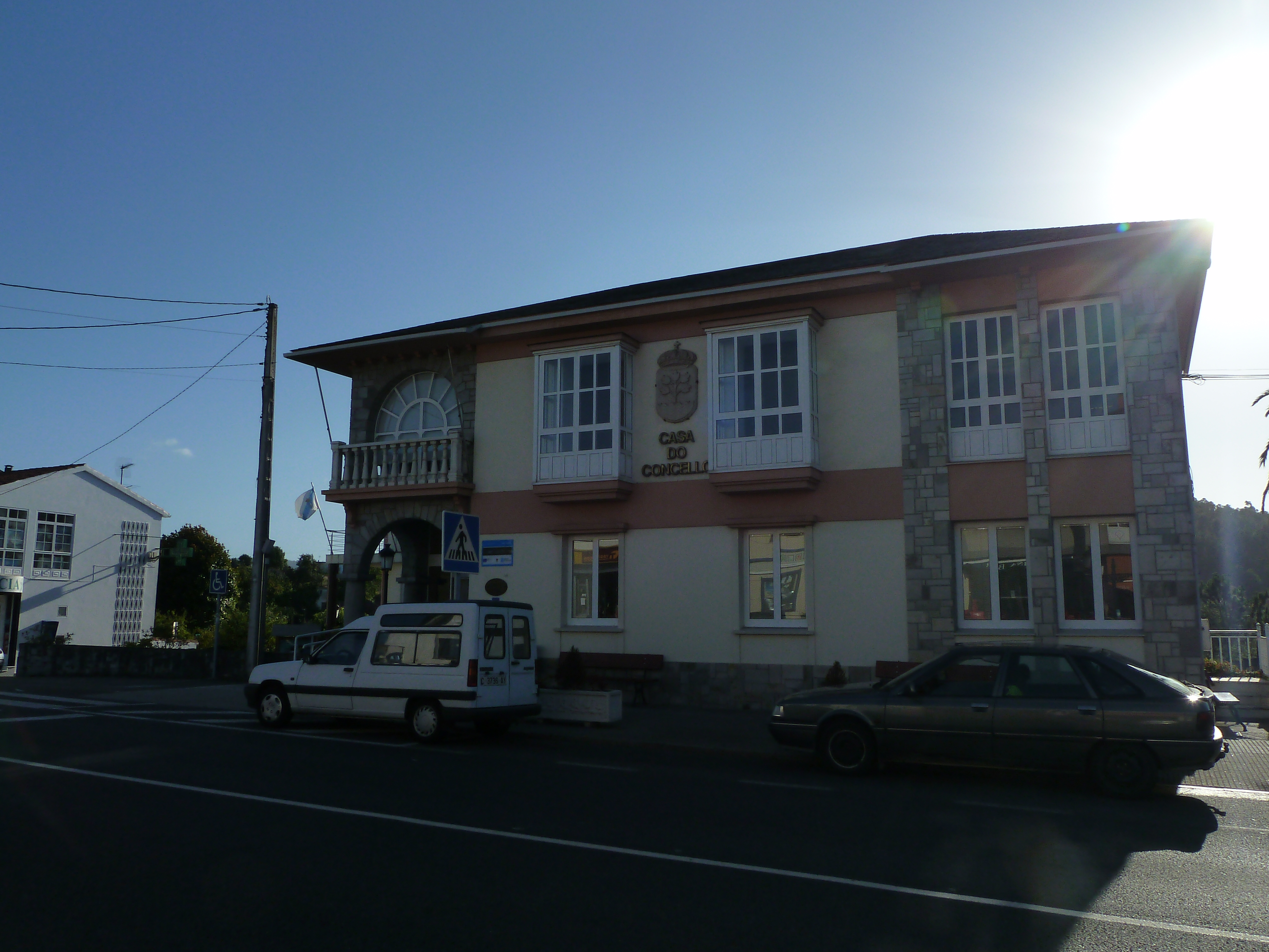 Casa do concello de Abegondo, provincia da Coruña.